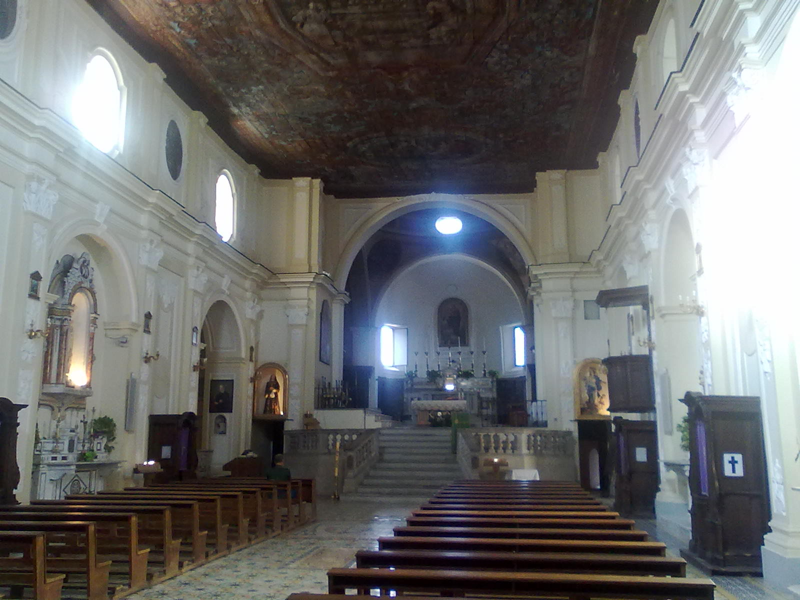 Interno della concattedrale di Policastro Bussentino